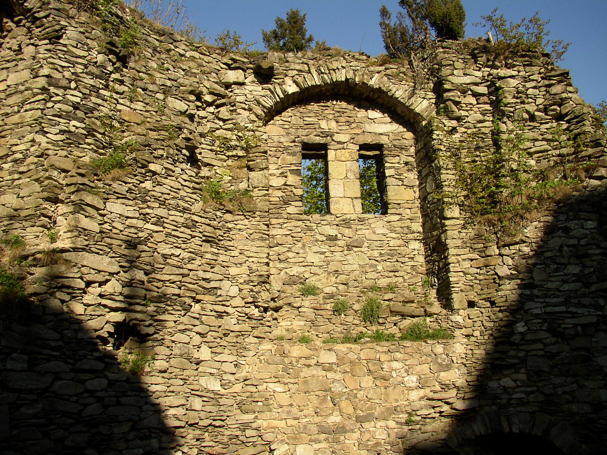 Okno bašty na Tolštejně, s pozdějšími pozměněnými úpravami